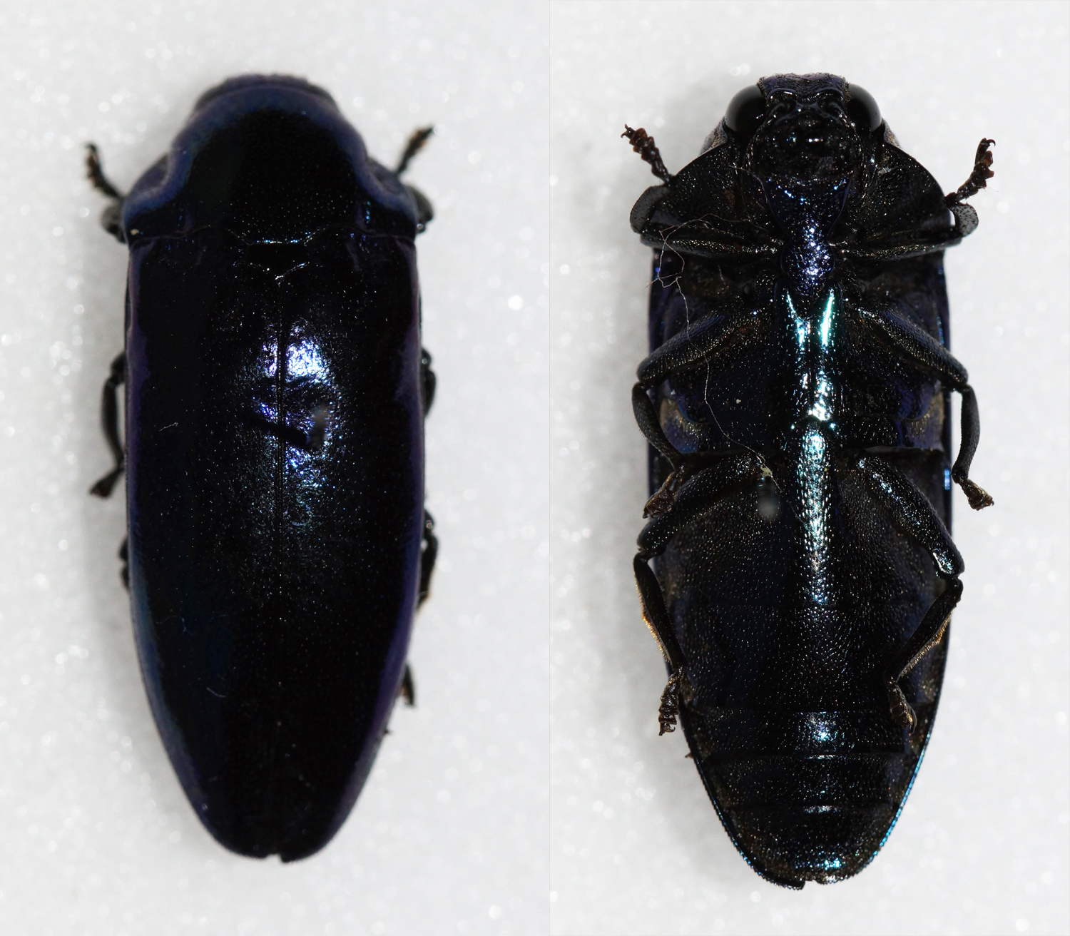 Buprestidae - In collection